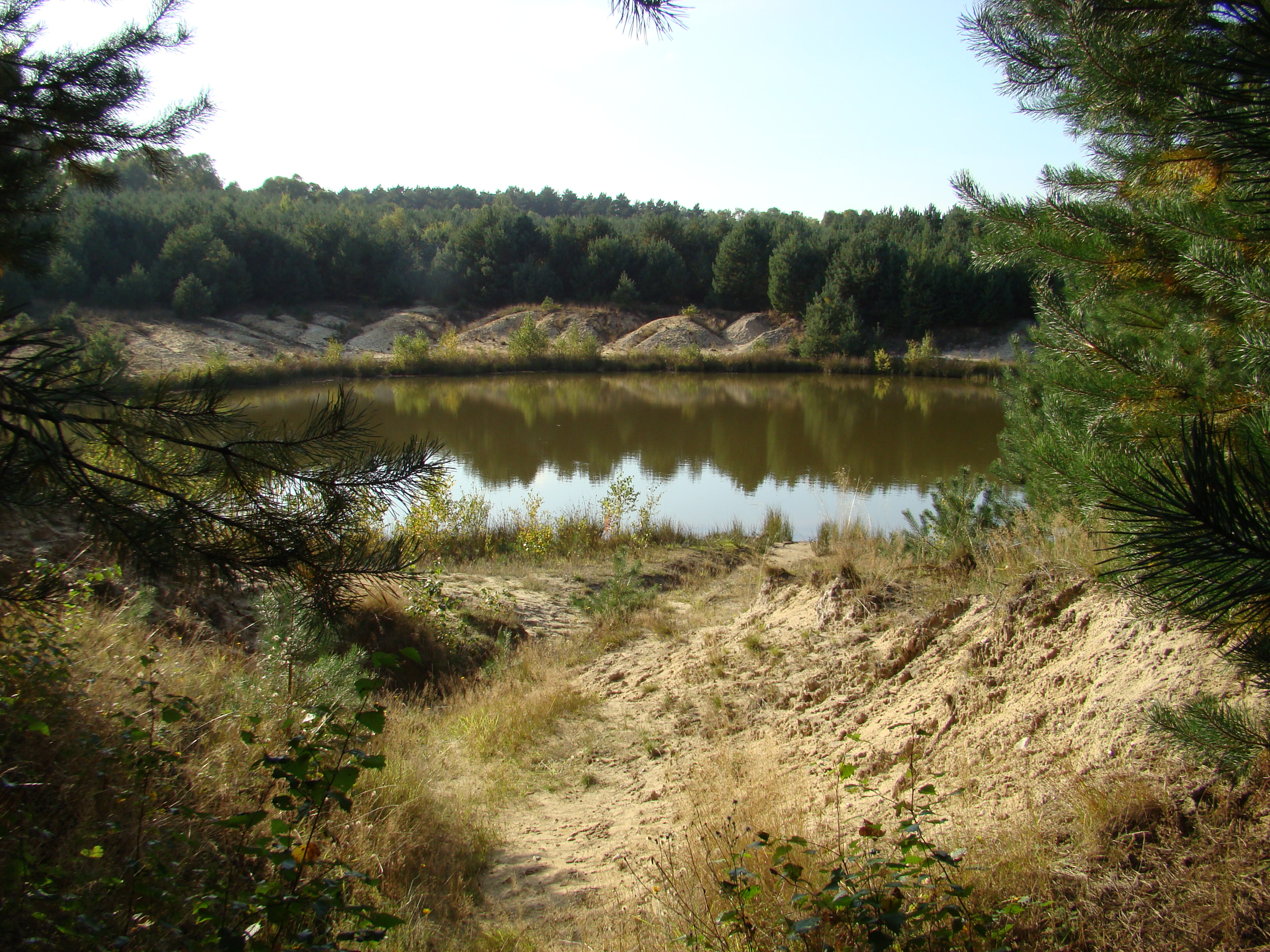 aufgelassene Kieselgurgrube in Neuohe, 2008